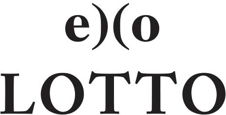 Logo del sencillo de EXO «Lotto»